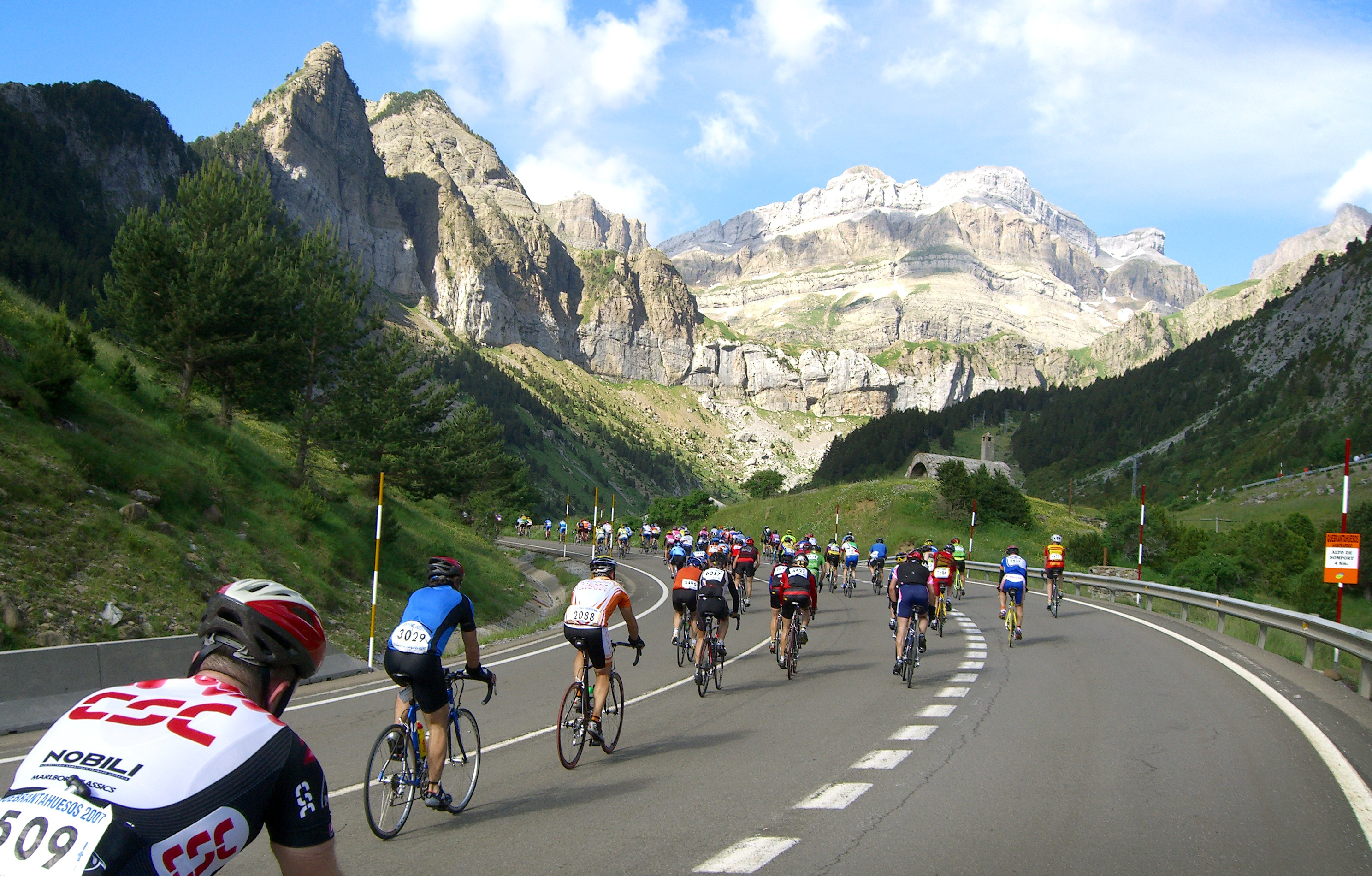 Quebrantahuesos 2007, puerto de Somport (Rioseta) en Aragón